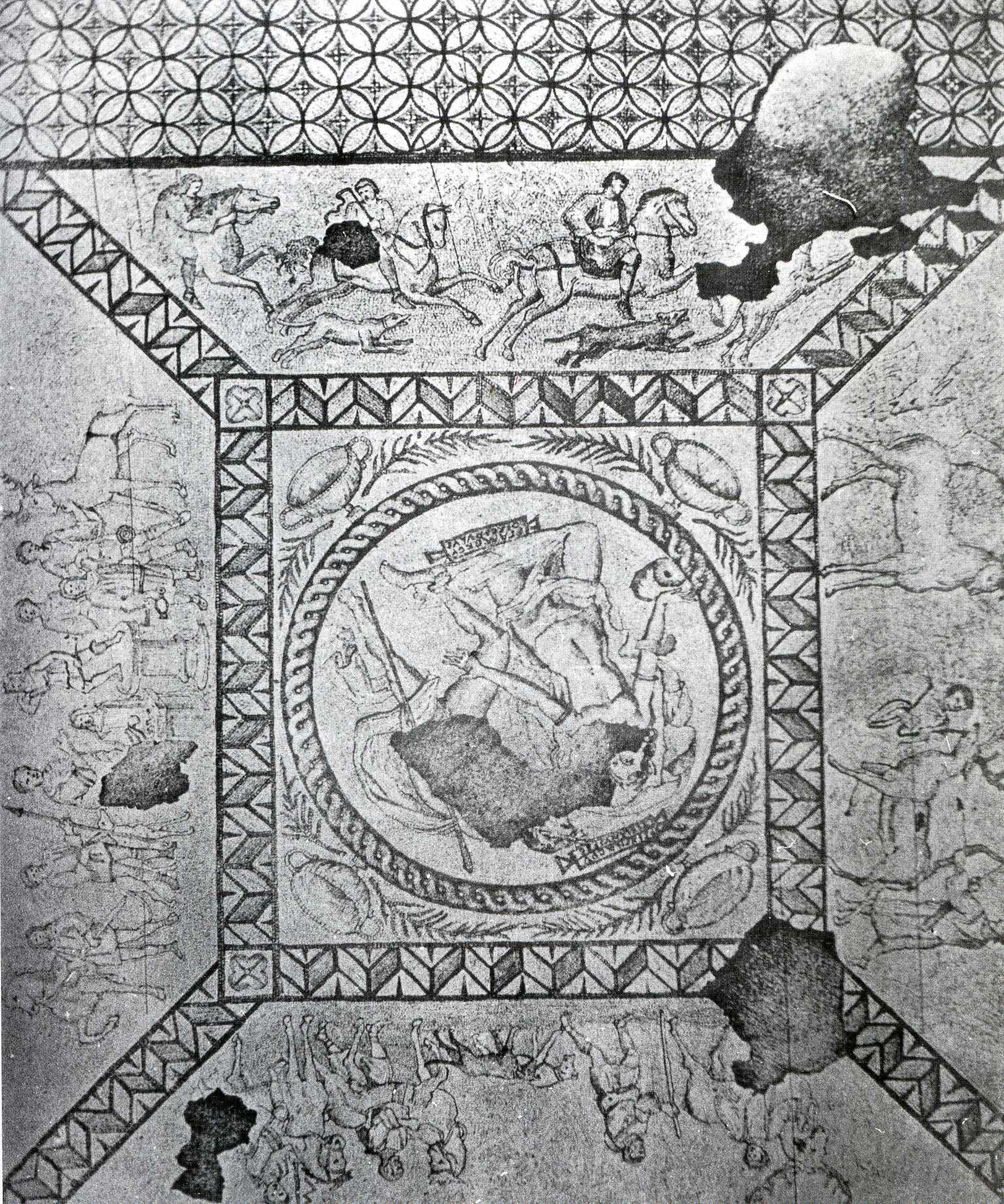 photo in situ de la grande mosaique de Lillebonne en 1870